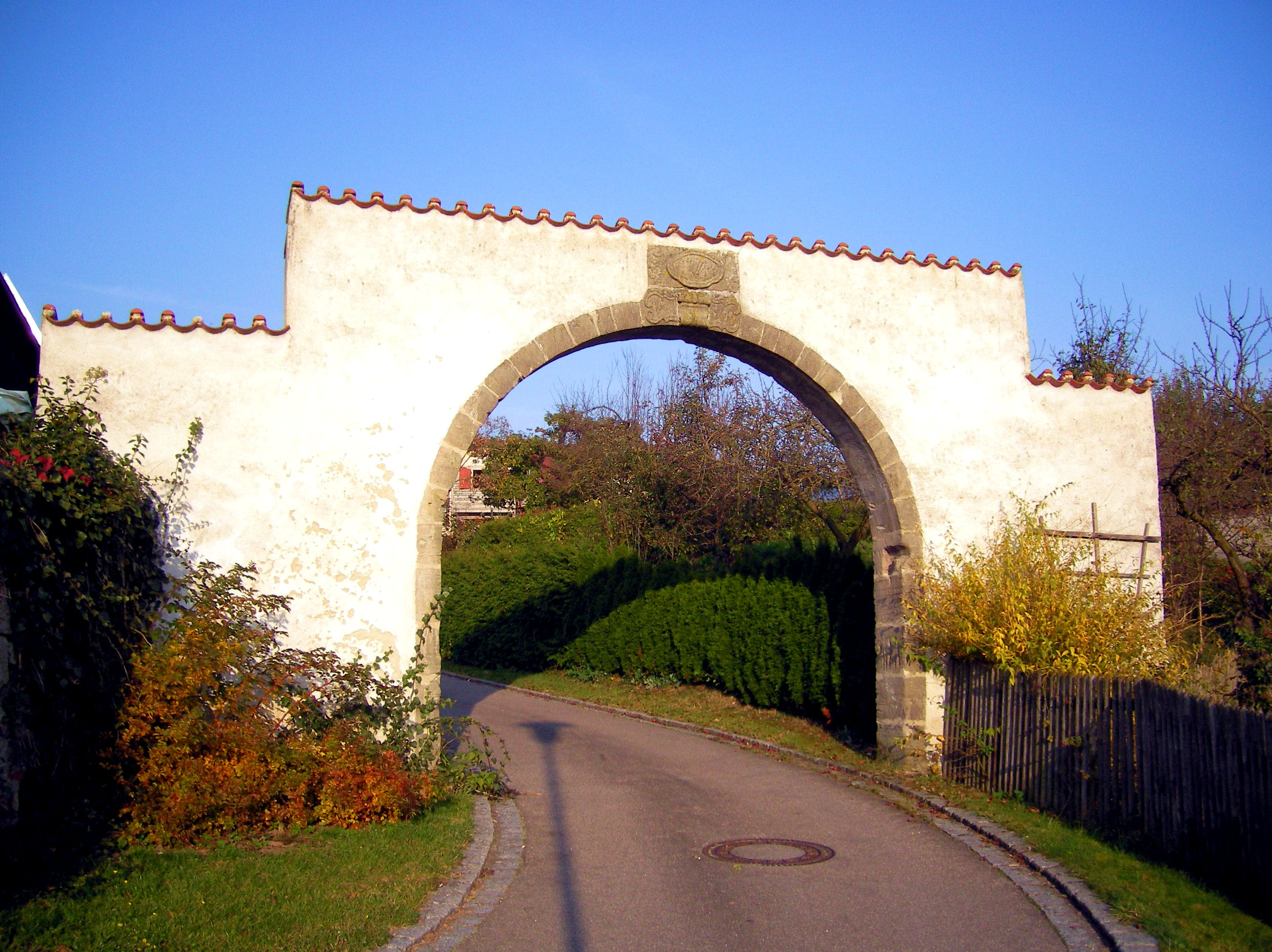 Trisching: Ehemaliges Hoftor in der Magdalenentalstraße